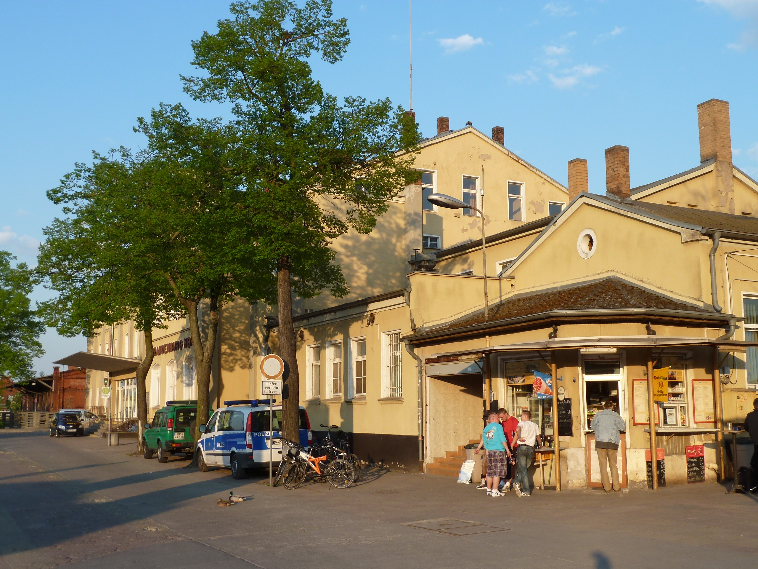 Brandenburg Hbf, Empfangsgebäude mit Kiosk